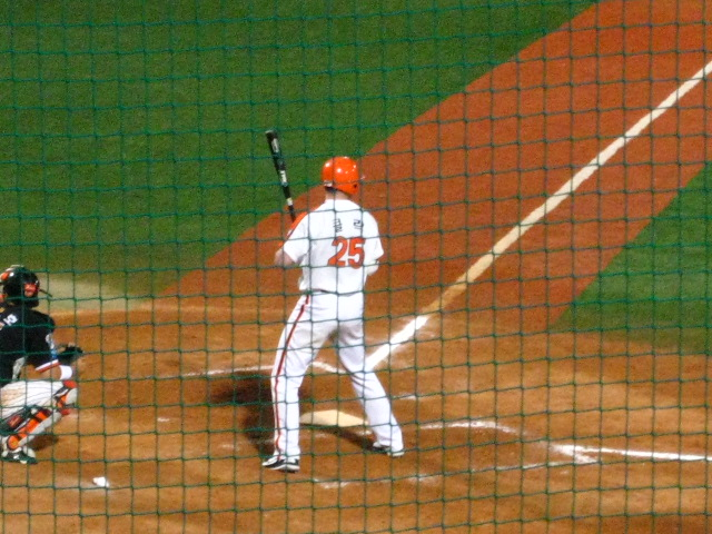 한화 이글스 외국인 선수 덕 클락